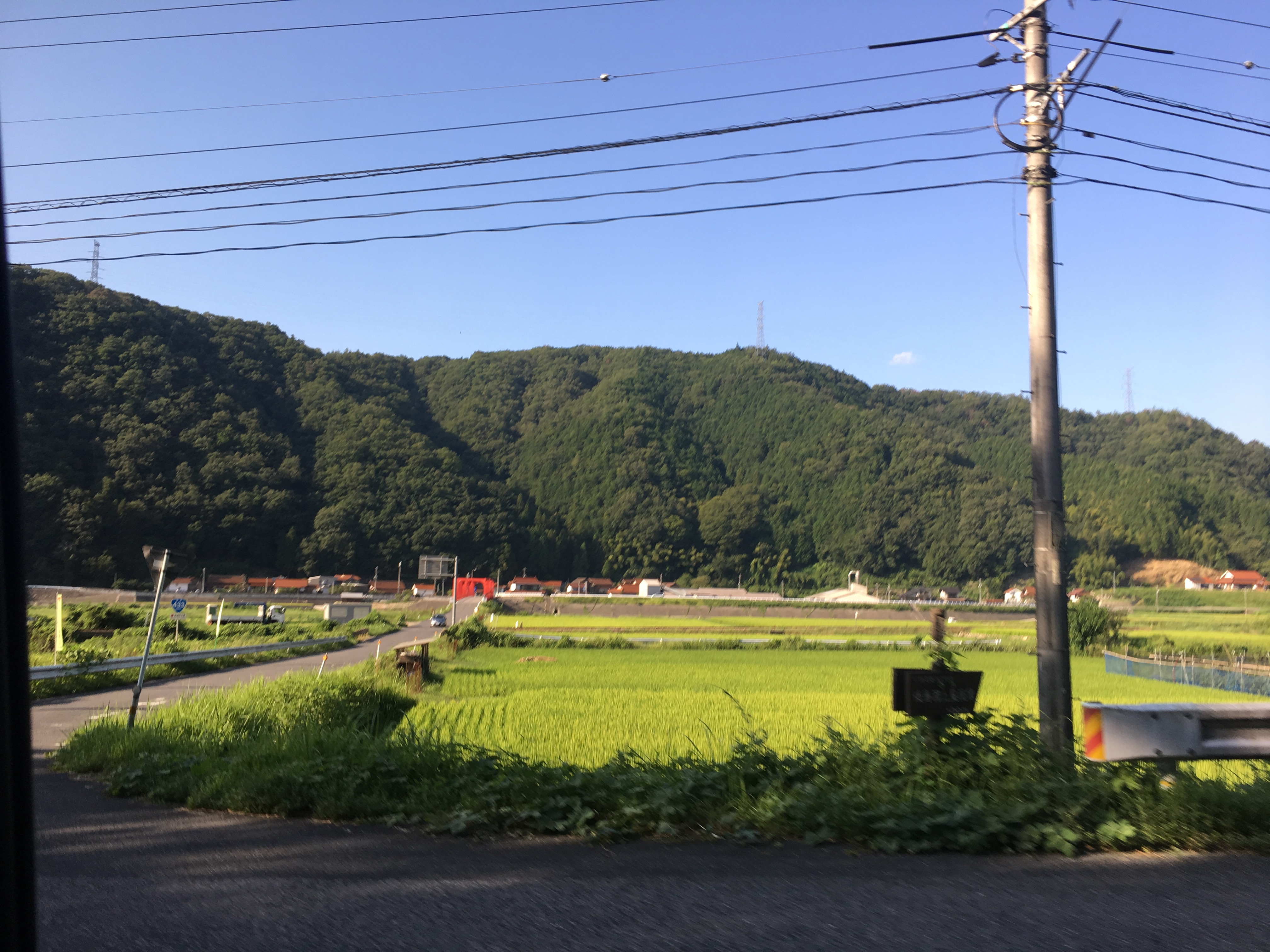 安芸高田市高宮町